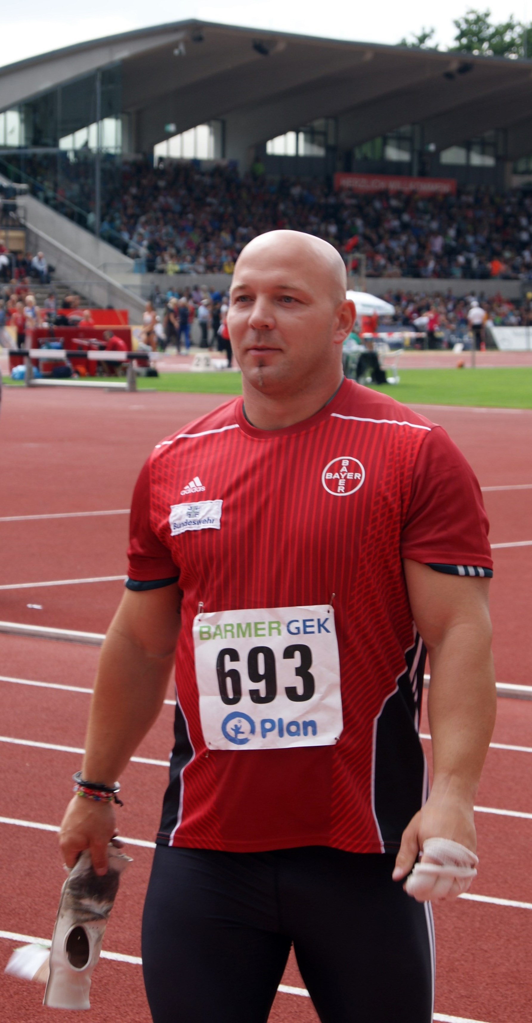 Markus Esser im Donaustadion Ulm. Deutsche Leichtathletik-Meisterschaften 27.7.2014